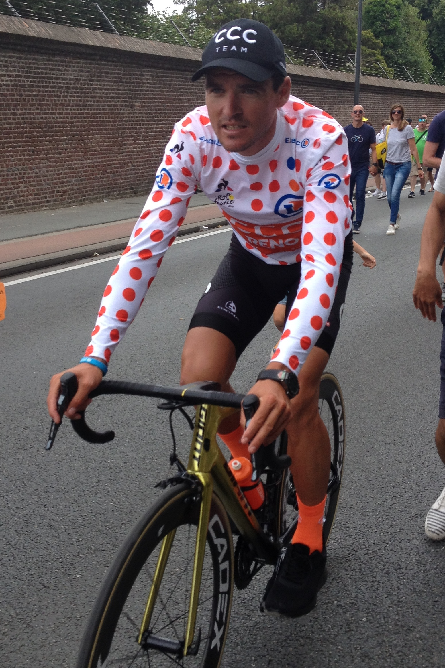 Grand Départ van de Tour de France in Brussel, finish in Laken op zaterdag 6 juli 2019